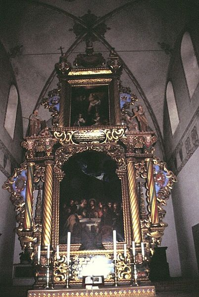 Sorø Klosterkirke